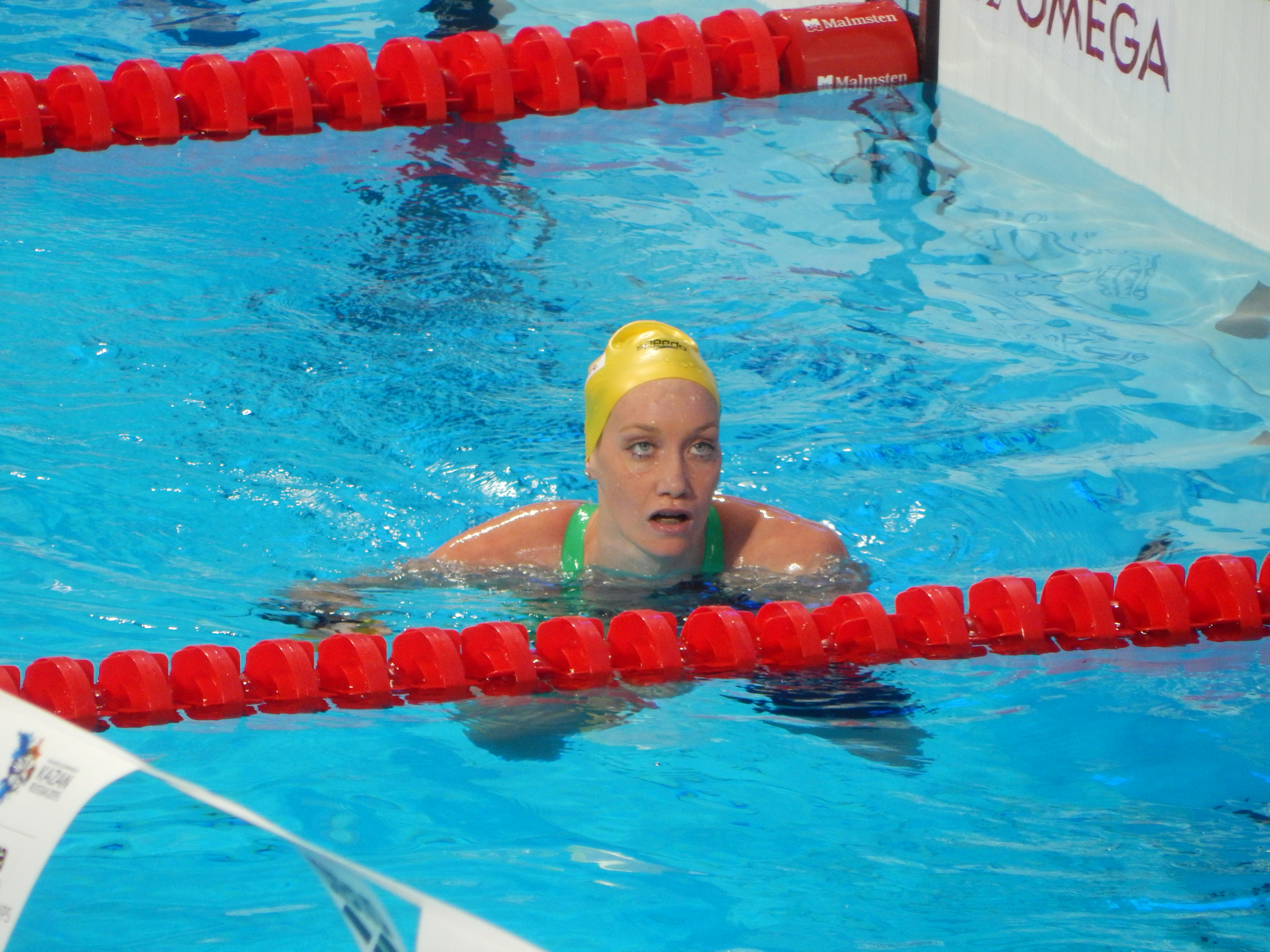 Мэдисон Уилсон после полуфинала плавания на спине (100 метров) в Казани на чемпионате мира